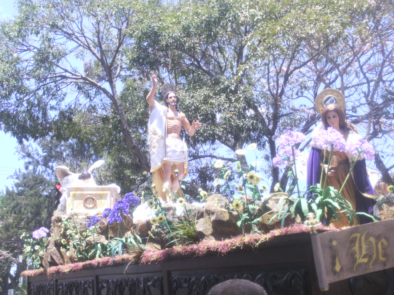 Procesión de Jesús Resucitado del Templo Nuestra Señora de Las Mercedes, Ciudad de Guatemala. Año 2008.